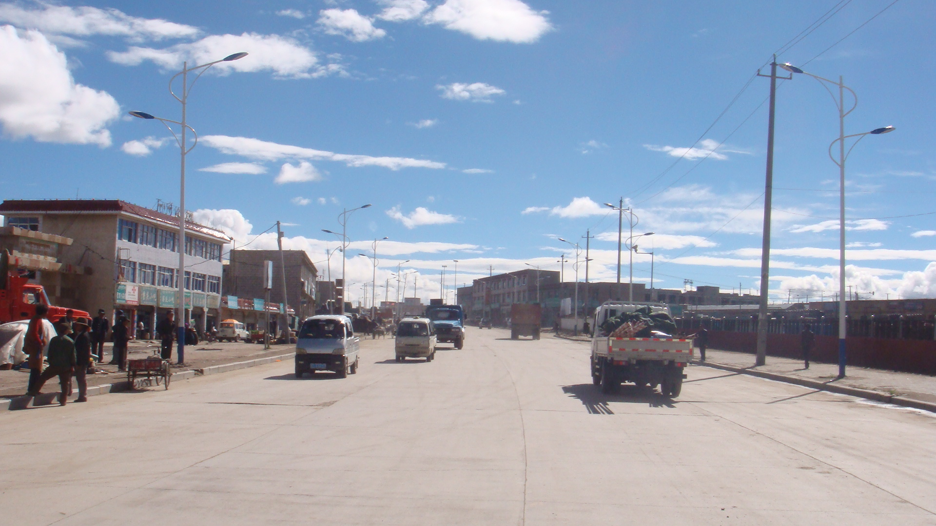 中国西藏那曲 China Tibet Naqu China Xinjiang Urumqi Welcome you to tour the, Китай Синьцзяна Урумчи приветствовать Вас на экскурсию, الصين ترحب زيارتك لاورومتشى فى شينجيانغ, 中国新疆のウルムチへの訪問を歓迎する, 中国新疆乌鲁木齐欢迎您来观光旅游，